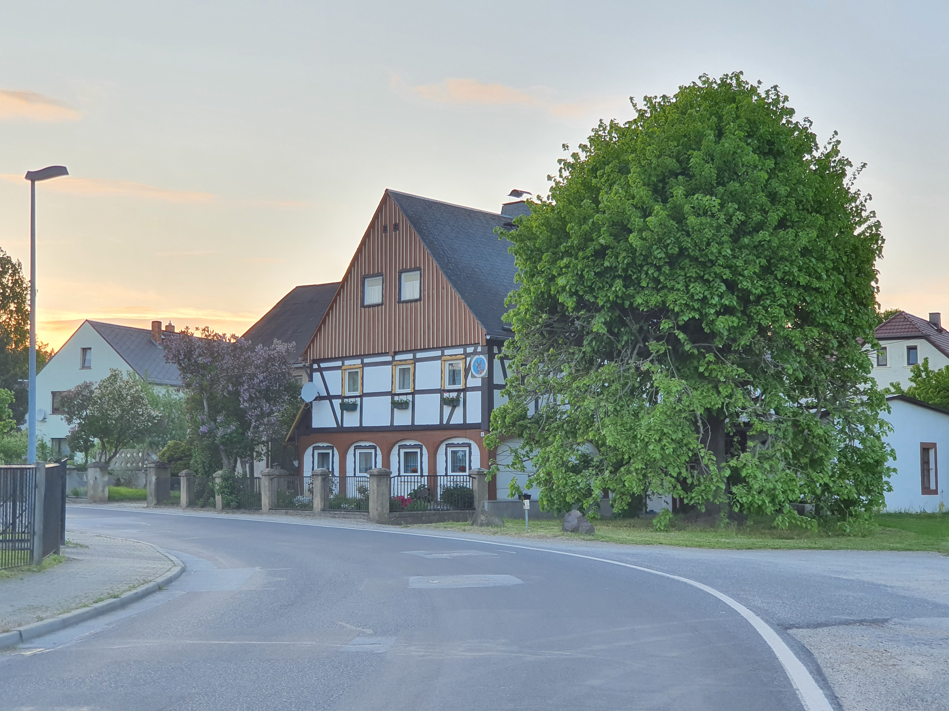 Wohnstallhaus (Umgebinde) Bederwitzer Straße 9